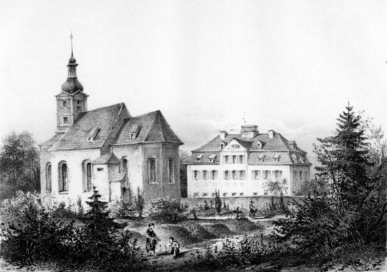 Die Marienkirche in Stötteritz um 1850 sowie das Herrenhaus des Rittergutes unteren Teils.